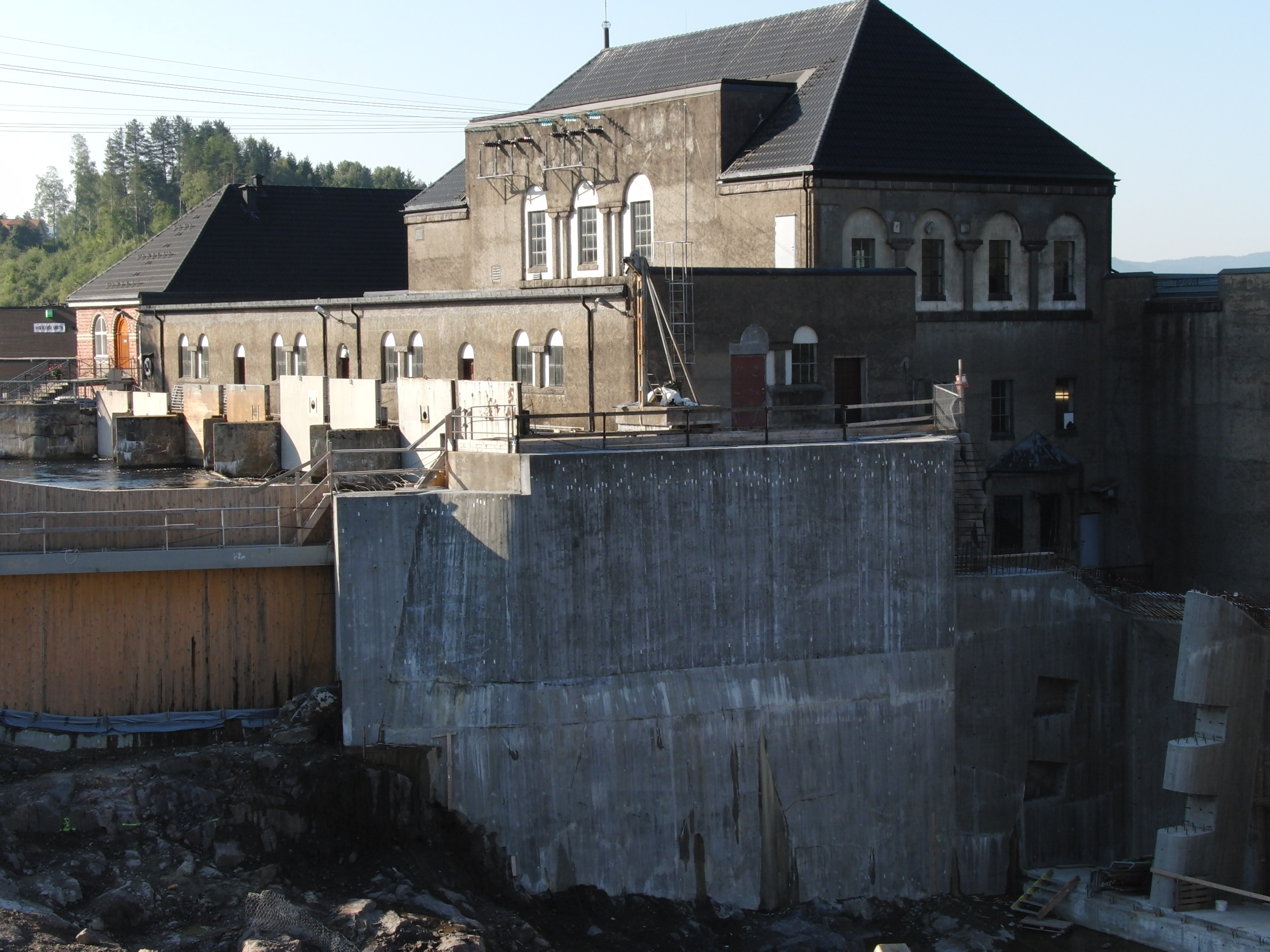 Vittingfoss kraftverk 2013, anleggsarbeider